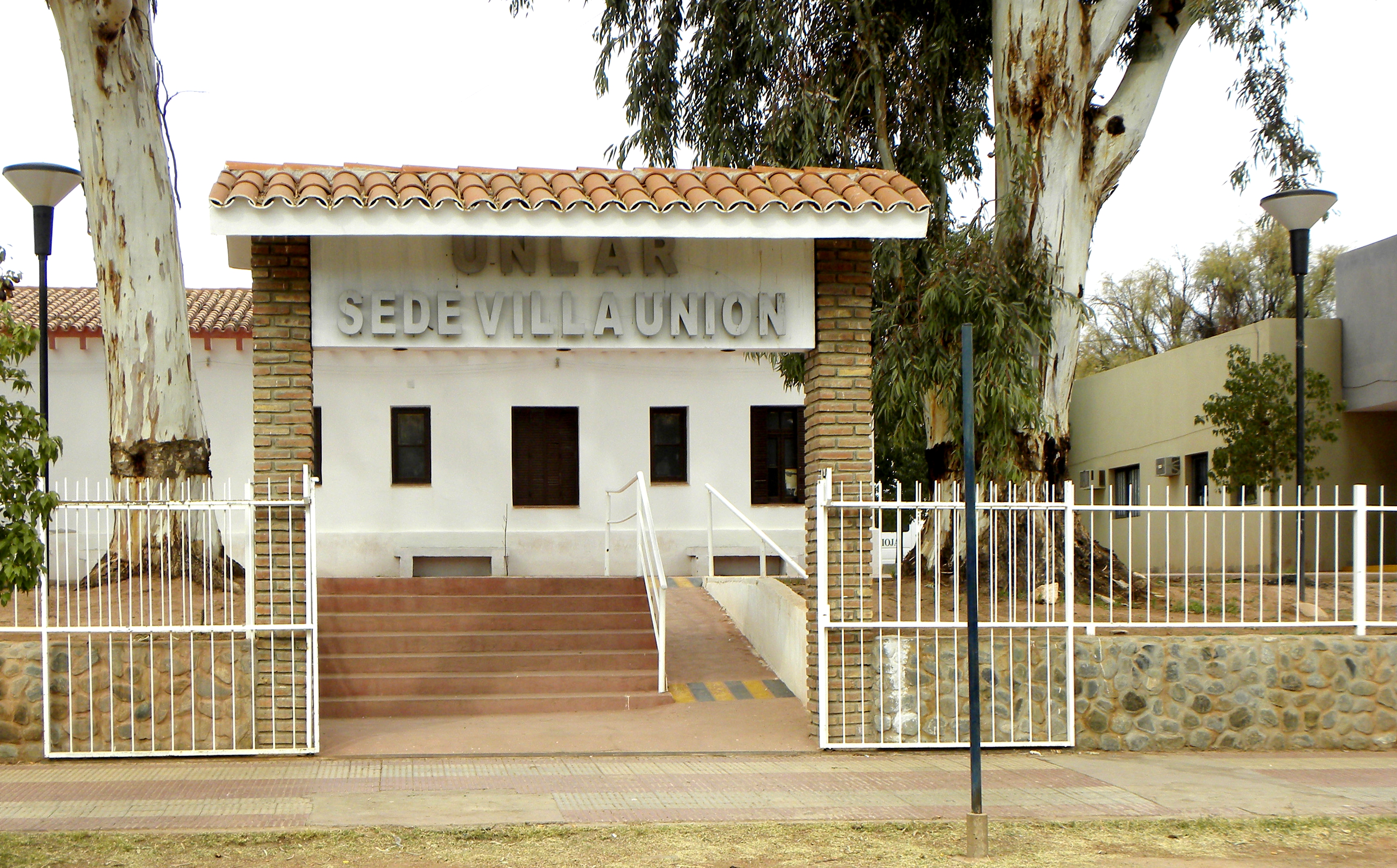 Instalaciones de la Universidad Nacional de La Rioja - Sede Villa Unión.